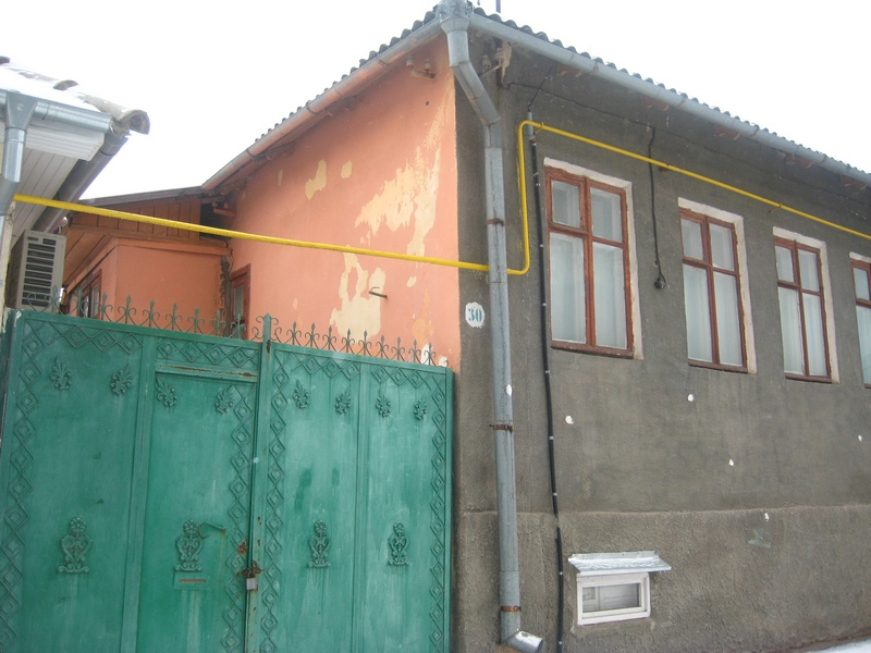 Здание бывшей синагоги приказчиков